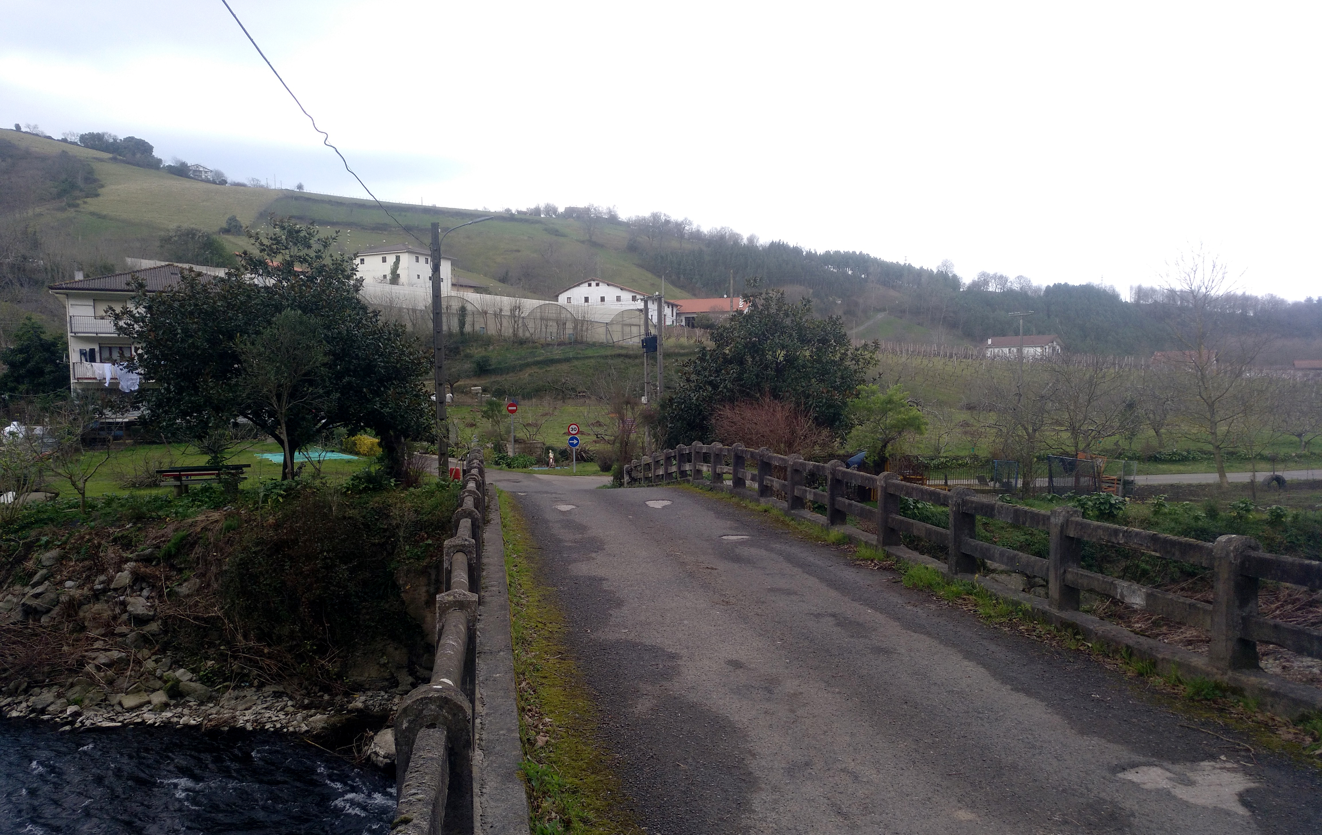 Aizarnazabalgo Etxabe auzoa